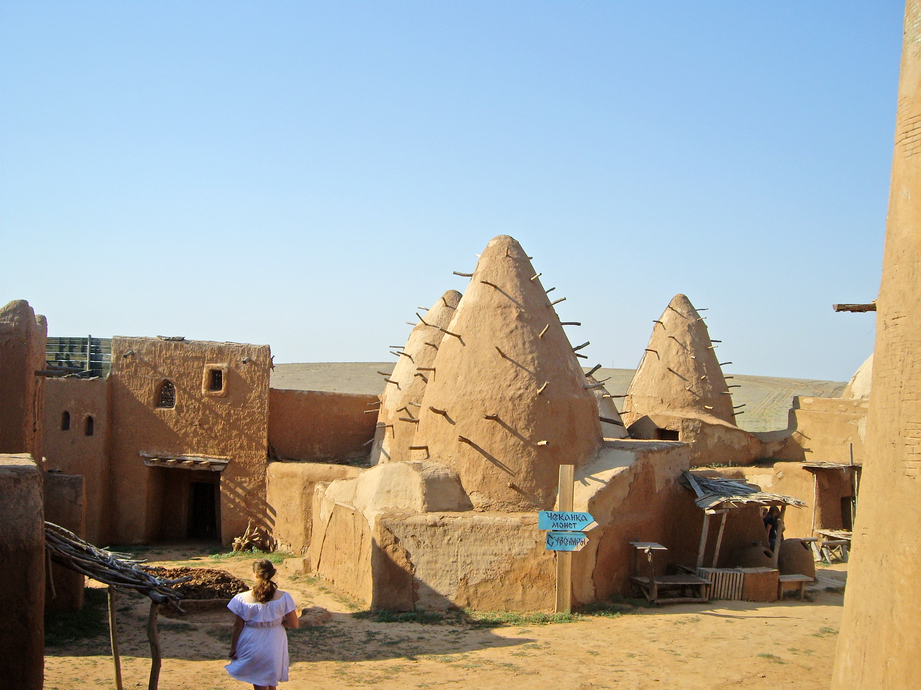 Декорации, выстроенные для фильма «Орда»